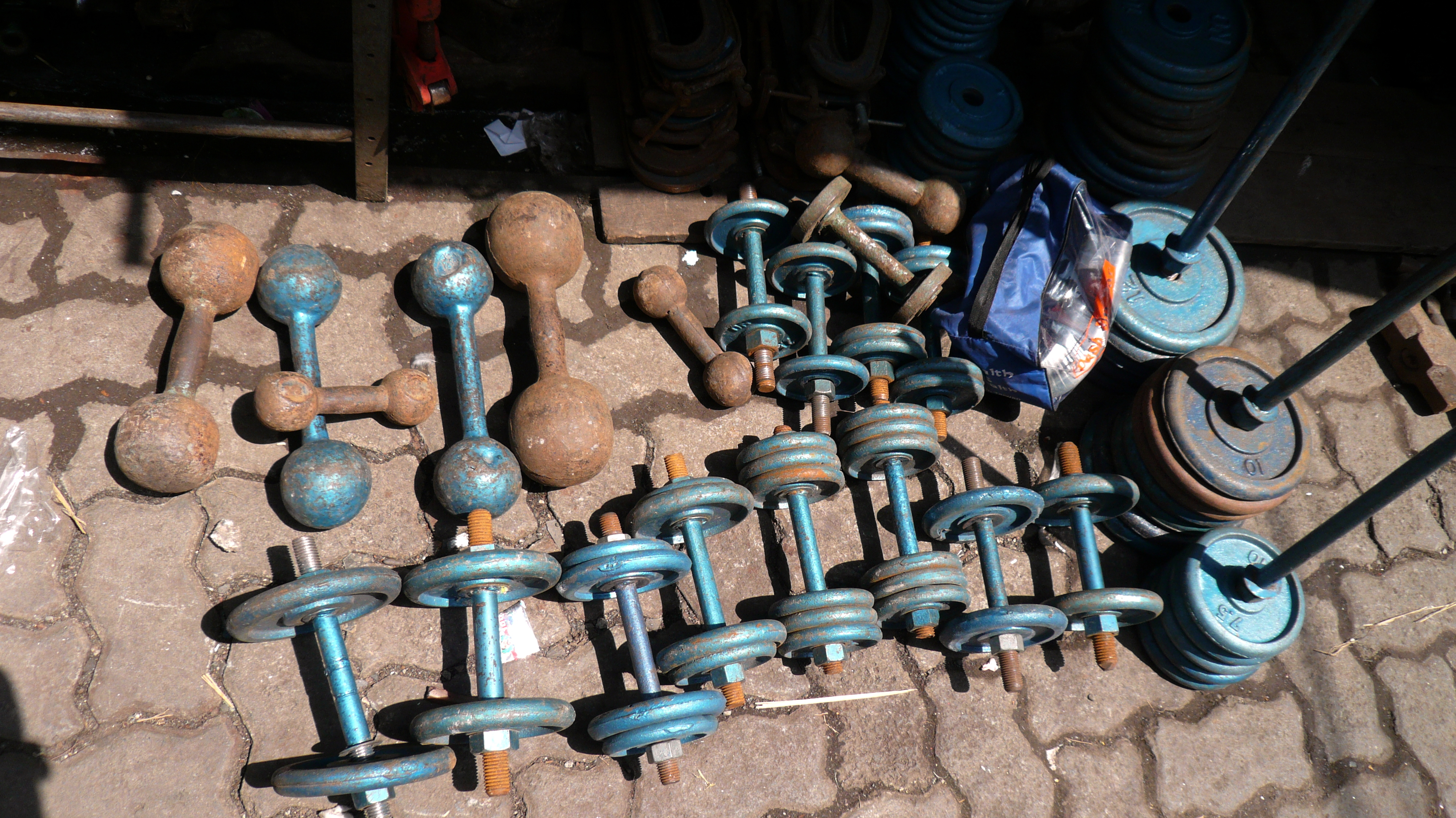 barbells, chor bazaar, mumbai